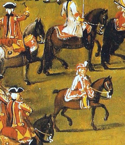 Prinz Wilhelm August (Junge/boy) - Revue von Bemerode 1735 - Detail!